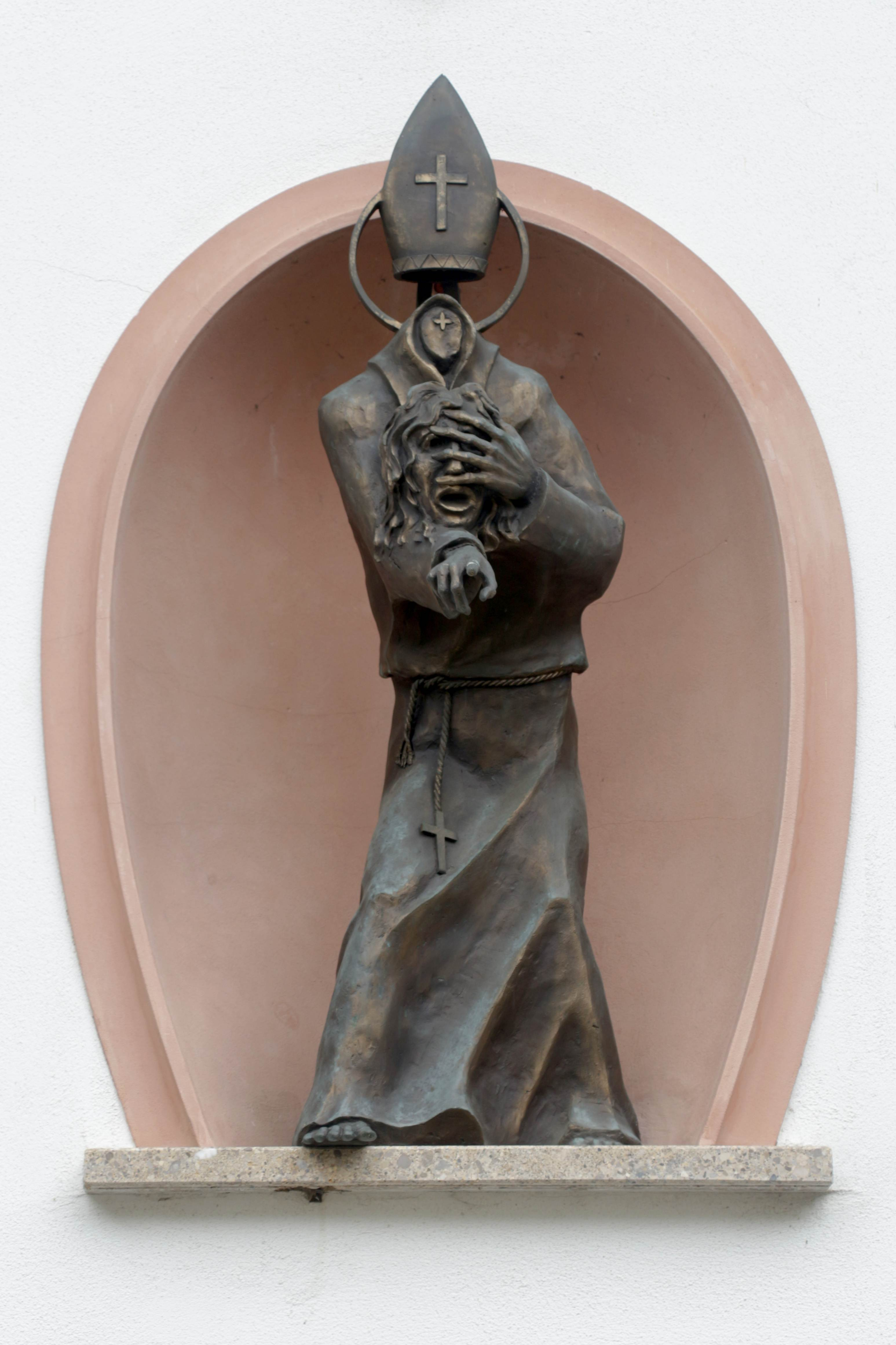 Statue des hl. Dionysius an der Außenmauer des Pfarrheims Bad Vigaun, Bezirk Hallein, Land Salzburg- Geschaffen Ende des 20. Jh. von Johann Weinhart.